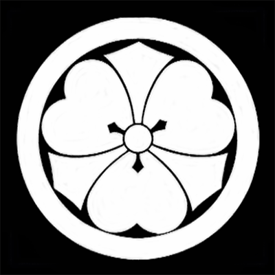 丸に剣片喰 、染め抜き